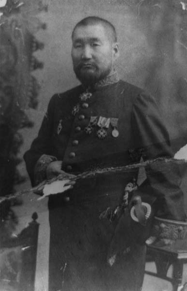 Н. Ф. Катанов (1862 - 1922) в вицмундире с наградами